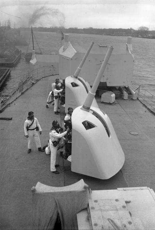 Neueste Aufnahmen der deutschen Flotte bei der Flottenparade in Swinemünde an der Ostsee! Blick auf das Deck der "Königsberg" mit den Flugabwehrkanonen und der Bedienungs-Mannschaft mit Gasmasken!